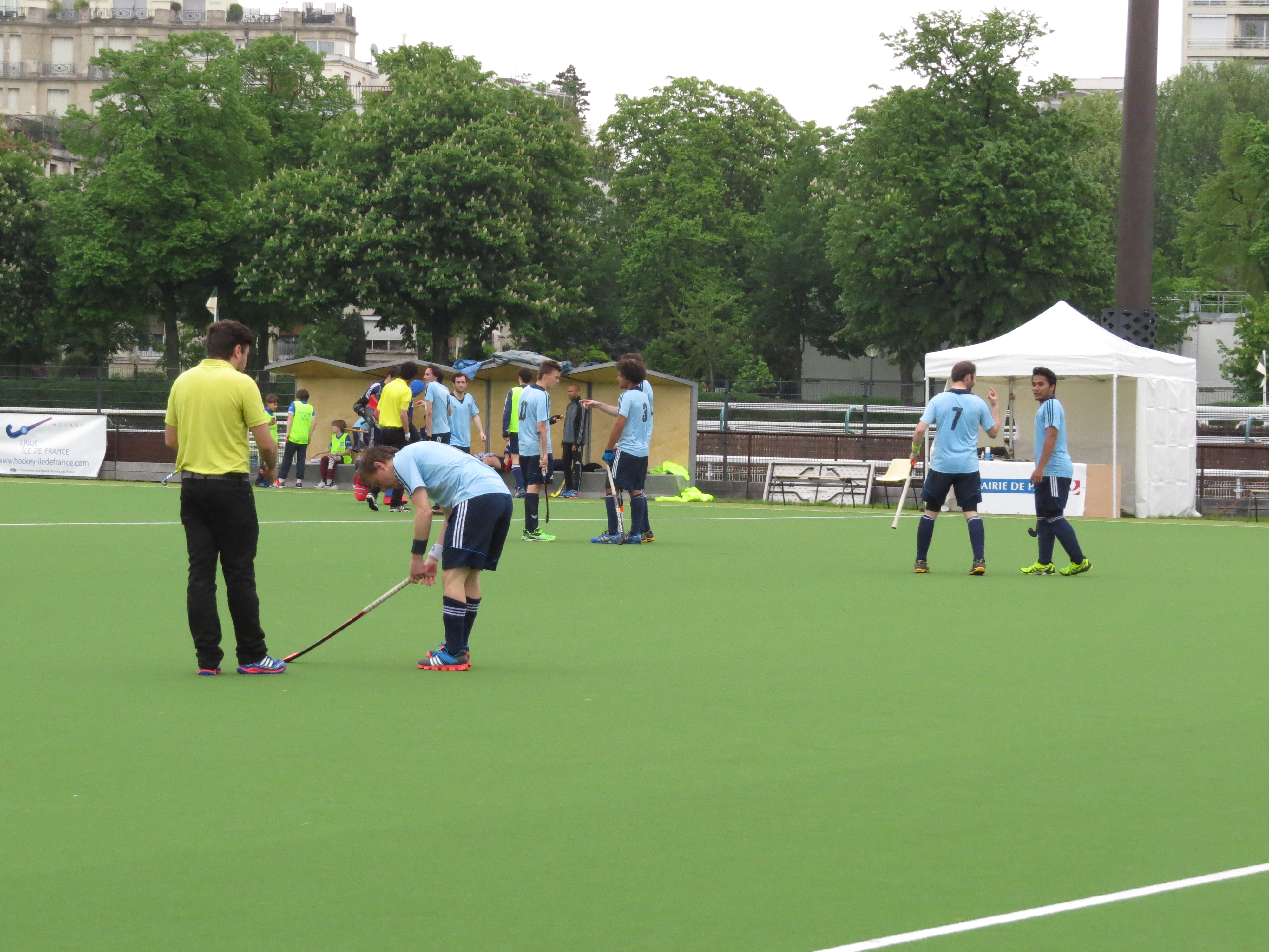 Championnat de France masculin de hockey sur gazon 2014-2015: Paris Jean Bouin - Lyon Victoire du PJB 5-4